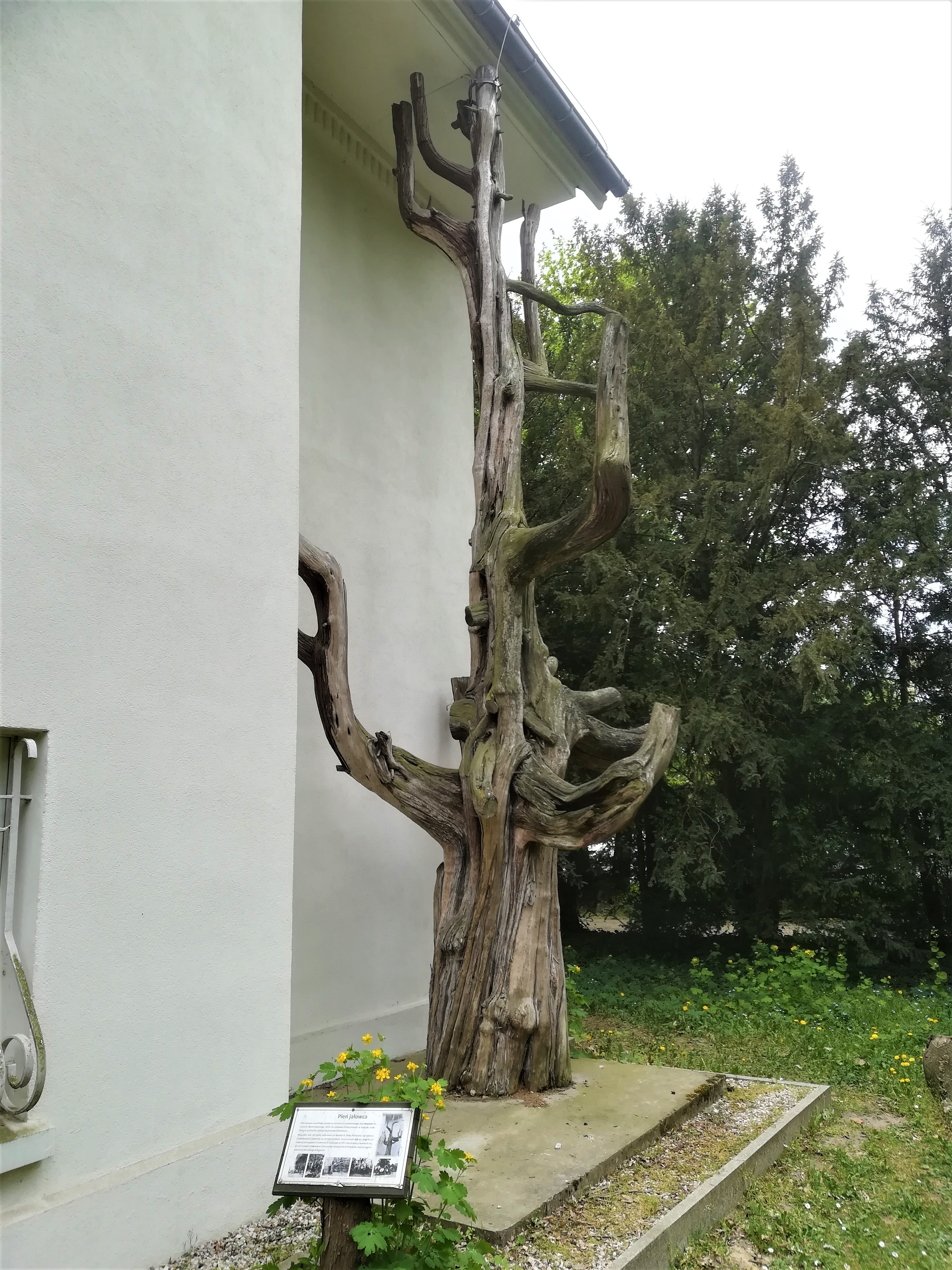 Jałowiec z Nepli w Arboretum Kórnickim.